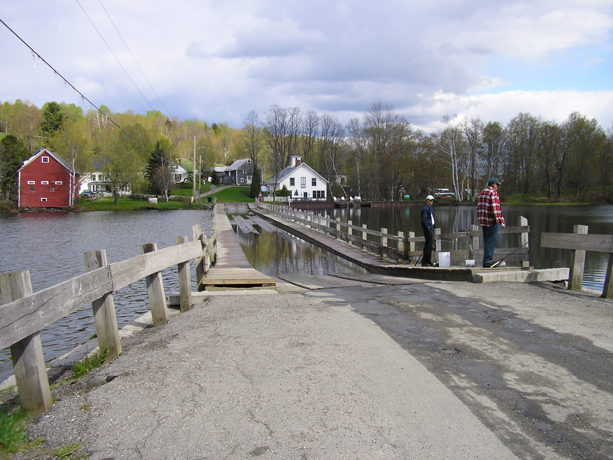 Floating Bridge in Brookfield, Vermont.